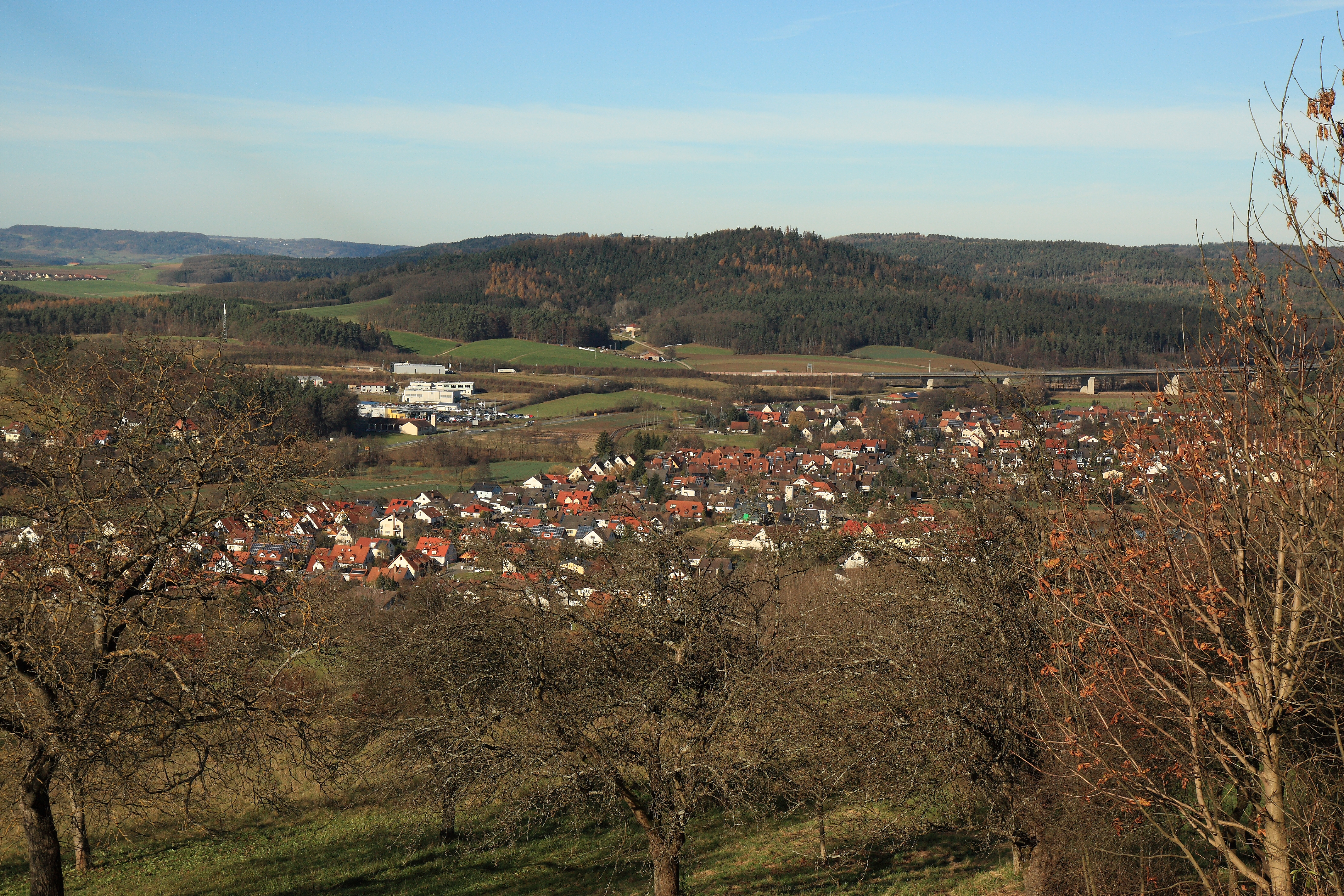 Der Alte Rothenberg aus südöstlicher Richtung, im Vordergrund der Markt Schnaittach.